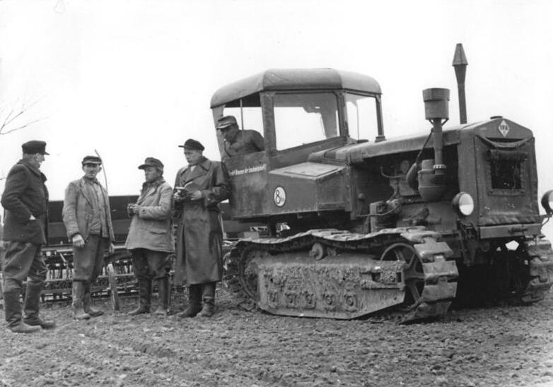 LPG Jahna, Begutachtung der Arbeitsleistung Zentralbild Siegert-1954 LPG "Walter Ulbricht" in Jahna beendete Frühjahrsaussaat. Die Landwirtschaftliche Produktionsgenossenschaft "Walter Ulbricht" in Jahna konnte am 17.3.1954 melden, dass sie die Frühjahrsaussaat vorfritstig abgeschlossen hat. Damit ist die Genossenschaft die erste im Bezirk Dresden, die diese Arbeiten beendet hat. Auf die Frage, warum die Genossenschaftsbauern so vorbildlich arbeiten kommten, antwortete der Arbeitsorganisator Kottmus: "Wir haben vor allen Dingen im Winter eine gute Planung durchgeführt, die wir nun in die Tat umsetzten. Besonders wesentlich war dabei die gute Zusammenarbeit mit unserer MTS in Schletta, die uns in jeder Weise vorbildlich unterstützte". UBz: Der Agronom der MTS Schletta, Koll. Rasser, überzeugt sich persönlich, ob dieser Schlag der LPG auch termingemäss fertig gedrillt wird. vlnr Arbeitsorganisator Kottmus, Genossenschaftsbauer Biegel, Brigadier und Genossenschaftsbauer Pohl, Agronim Rasser und Traktorist Roßberg von der MTS Schletta.